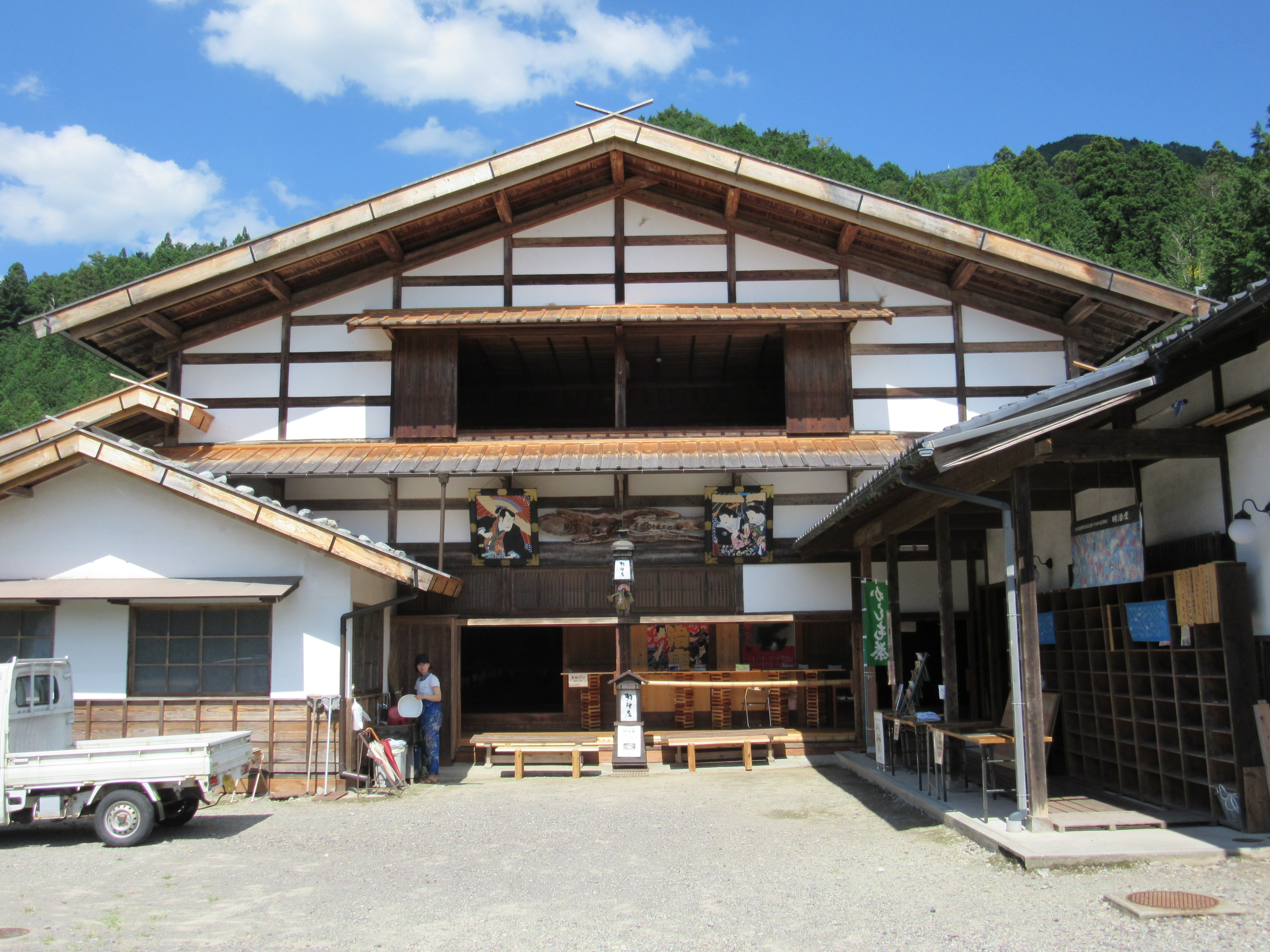 明治座 (岐阜県中津川市加子母)